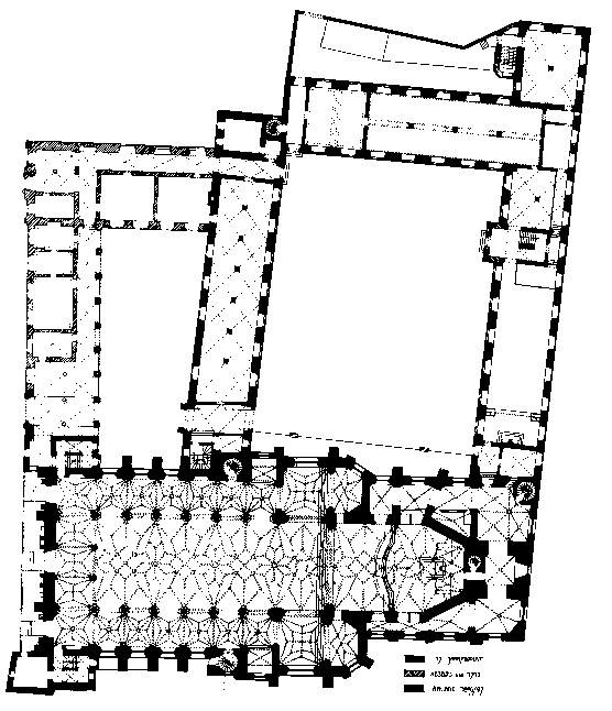 St. Mariae Hmmelfahrt, Köln (Grundriss) Foto: Rheinisches Amt für Denkmalpflege Autor: Detlef Thomas 11.12.2005